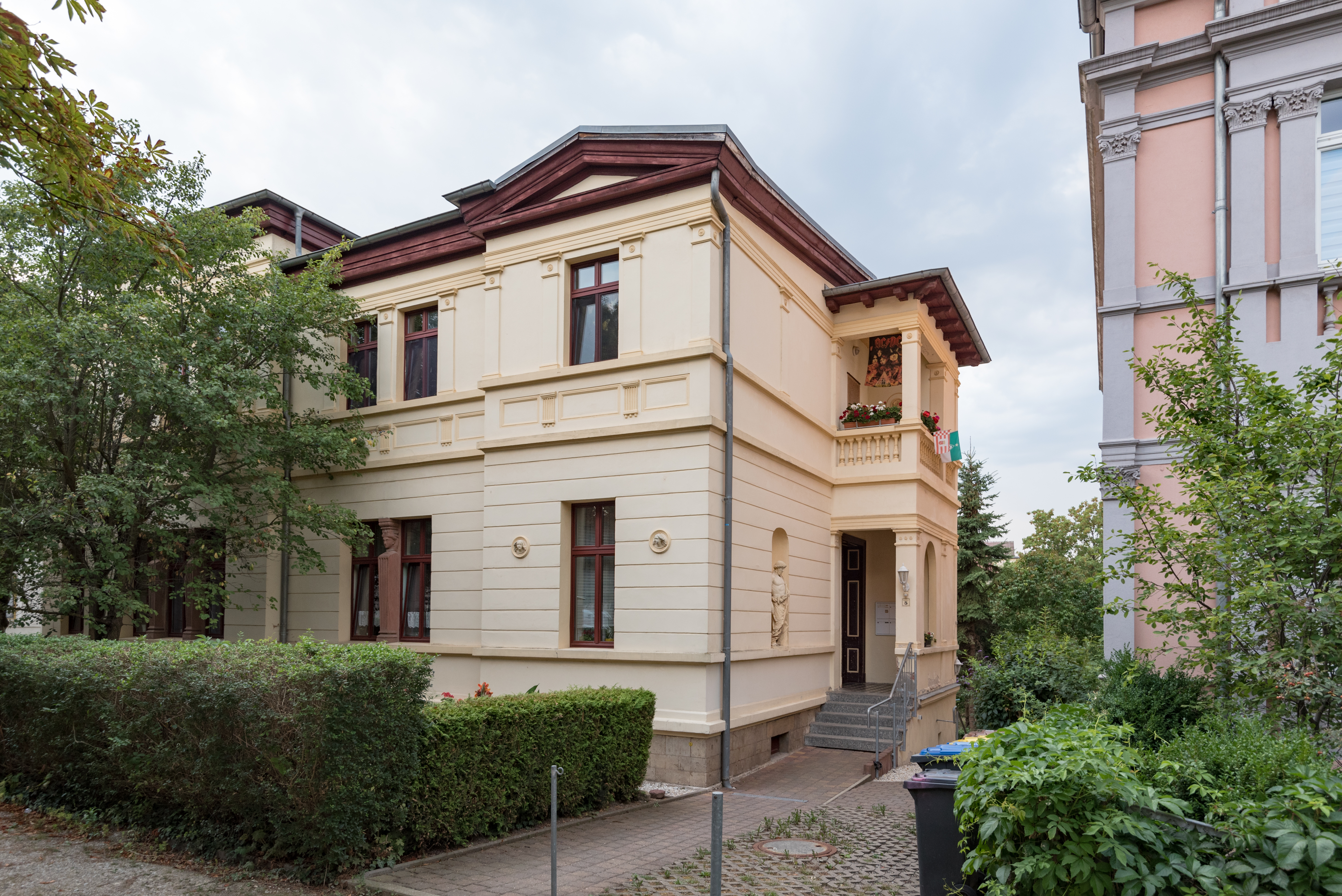 Naumburg (Saale), Bürgergartenstraße 5